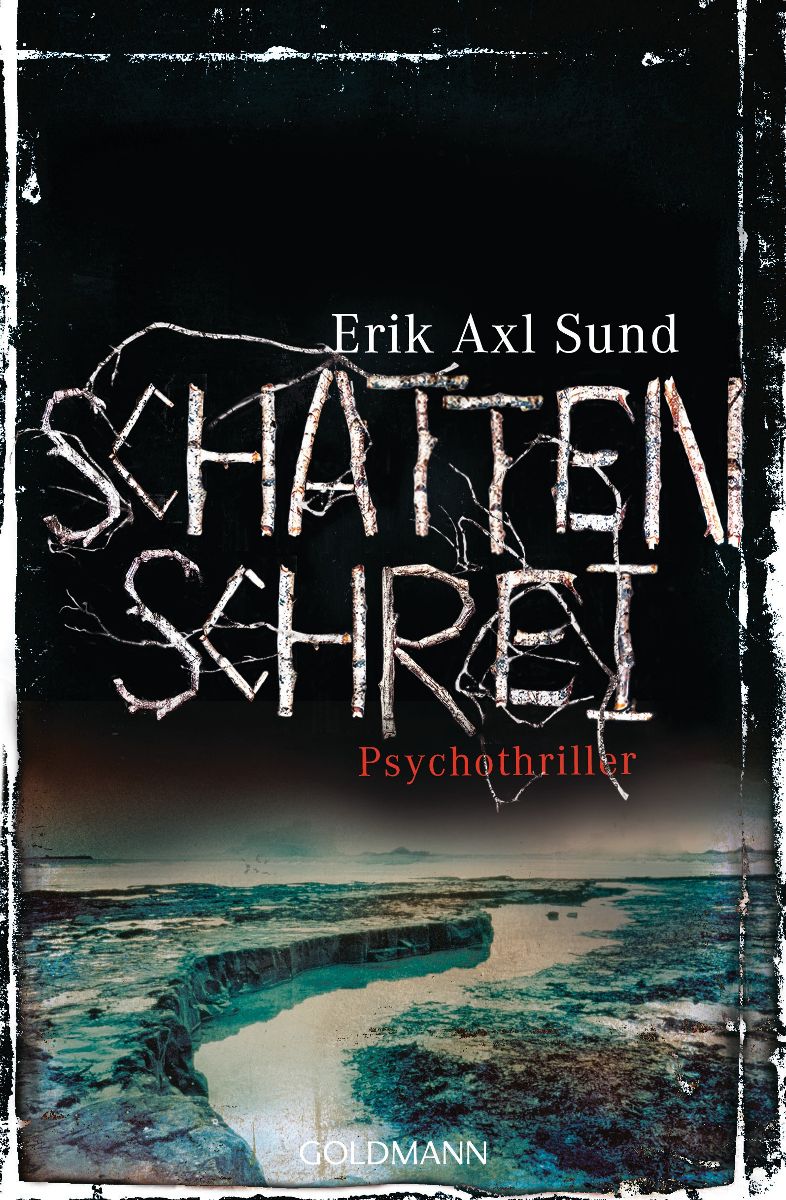 Erik Axl Sund: Schattenschrei. Goldmann, München 2014. DNB